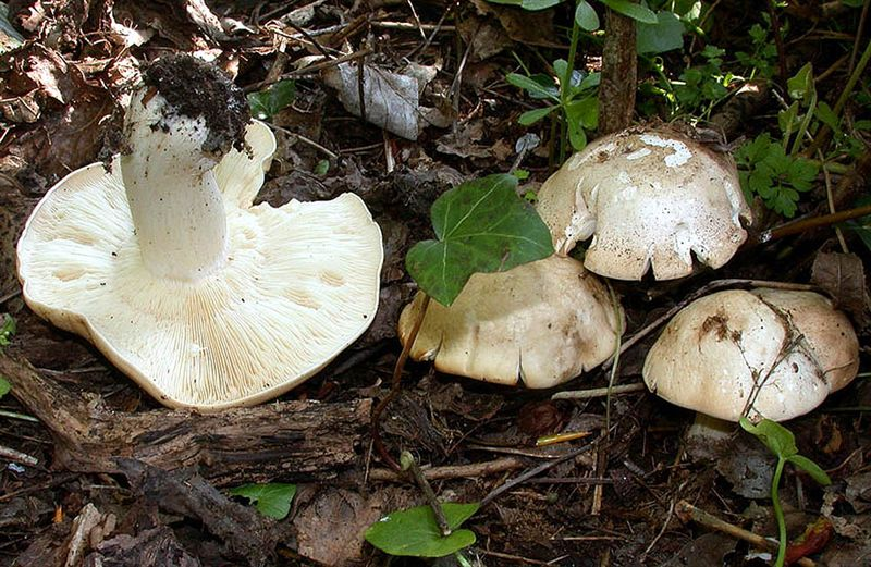 Champignon comestible Nom français : Tricholome de la Saint Georges Nom latin : Calocybe gambosa Photo : Jean-Jacques Wuilbaut Lieu : Mons (Belgique) Date : 21 avril 2002